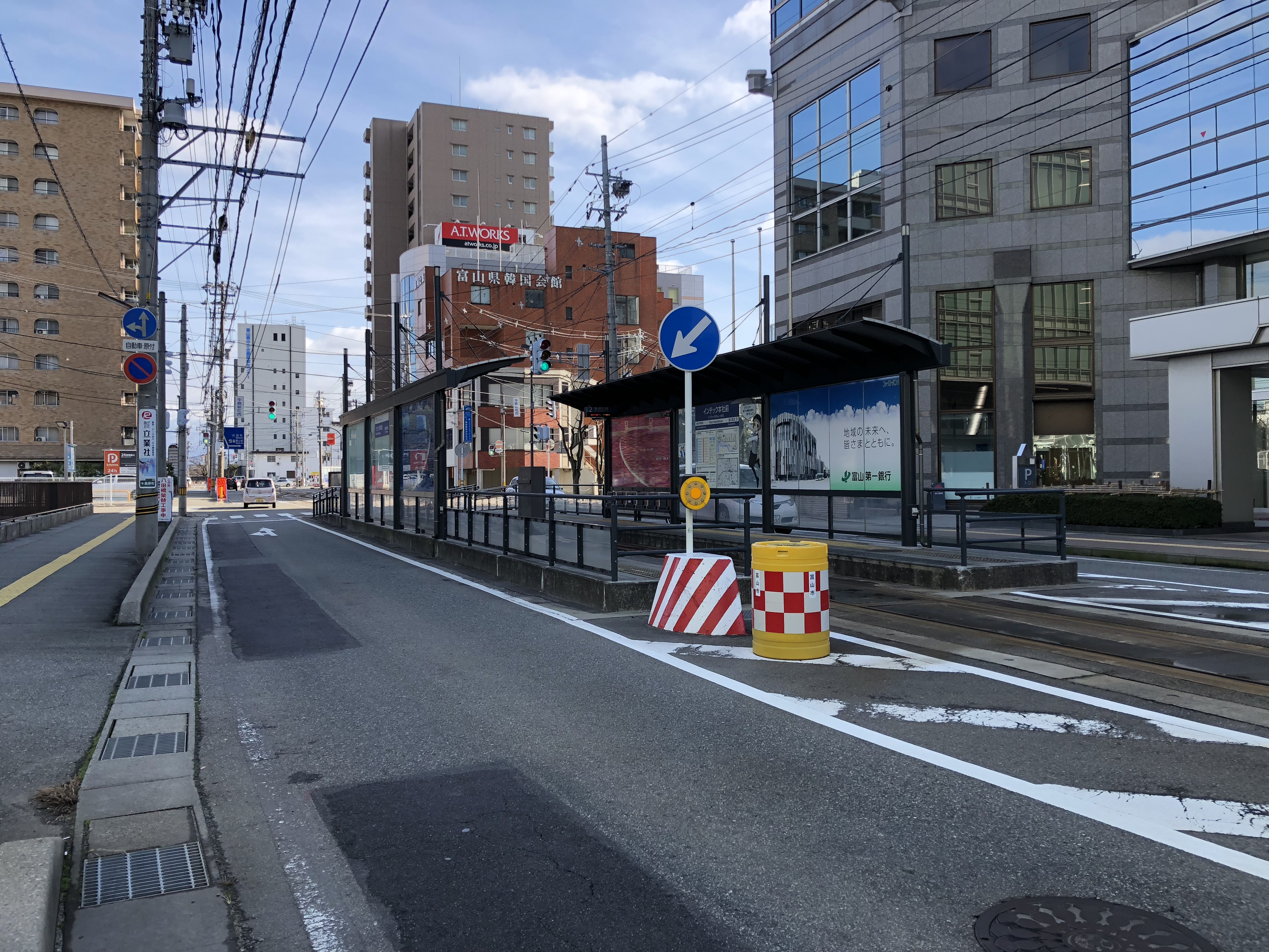 富山ライトレール富山港線インテック本社前停留場